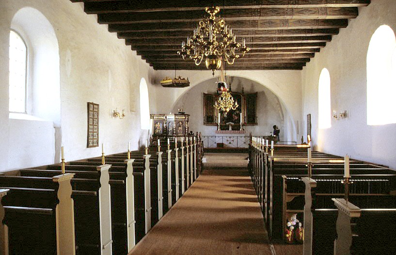 Voer Kirke i Danmark. Skibet set mod øst